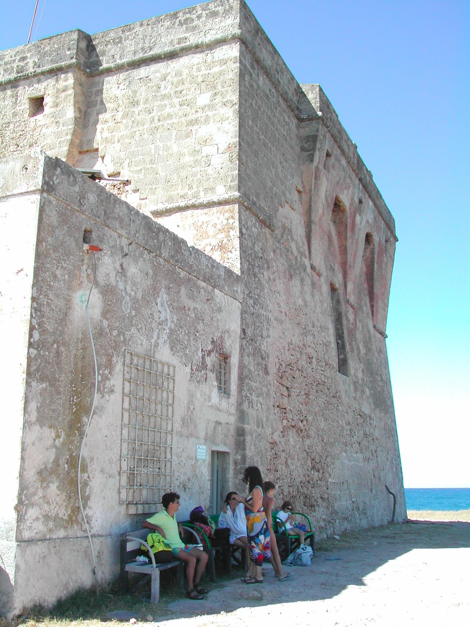 Riserva di Torre Guaceto - La torre, lato nord This is a photo of a monument which is part of cultural heritage of Italy. The authorisation for taking photos of this object was provided by the World Wide Fund for Nature Italy.